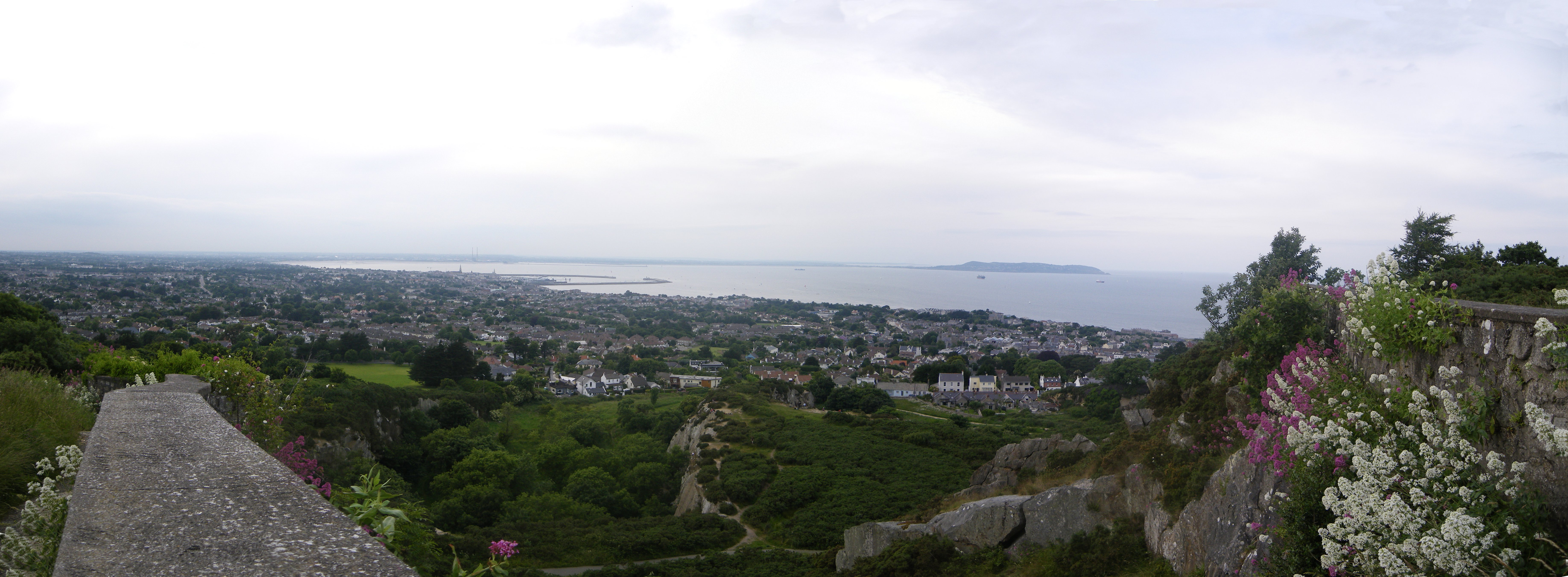 Baie de dublin depuis Dalkey Hill, avec Dublin a gauche, le port de Dún Laoghaire au millieu et la presqu'ile de Howth a droite